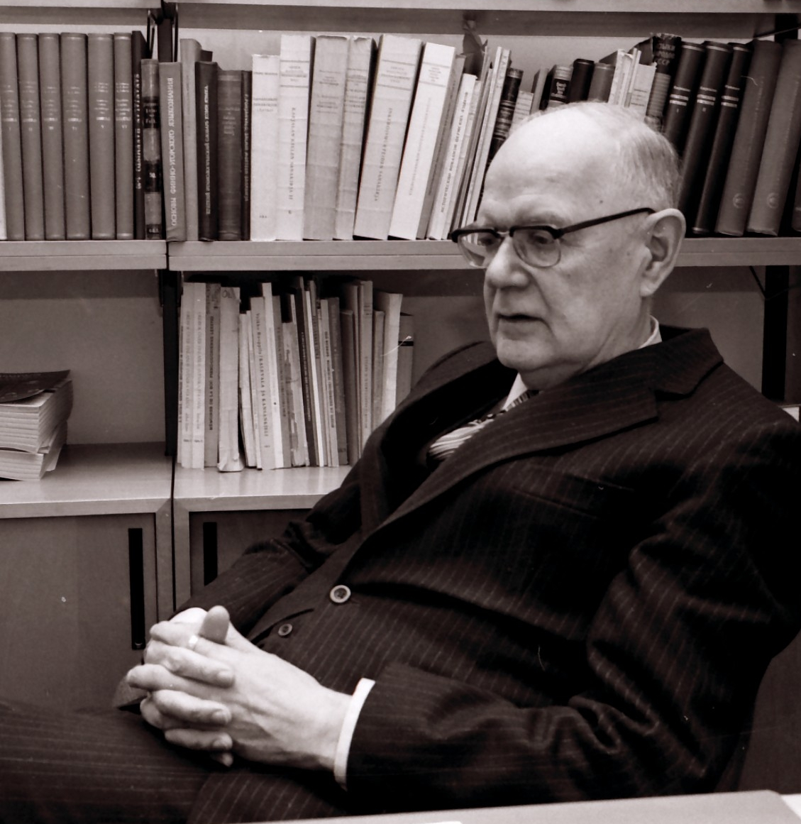 Erkki Itkonen työhuoneessaan (Helsingin yliopisto)